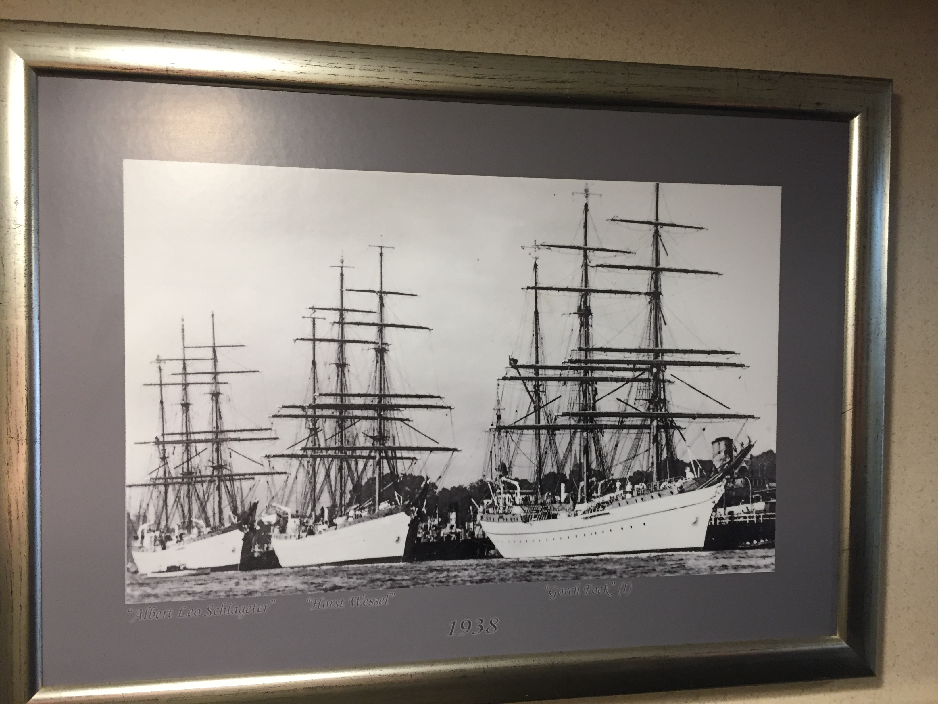 Schwesterschiffe der USCG 'Eagle' in der Offz.Messe